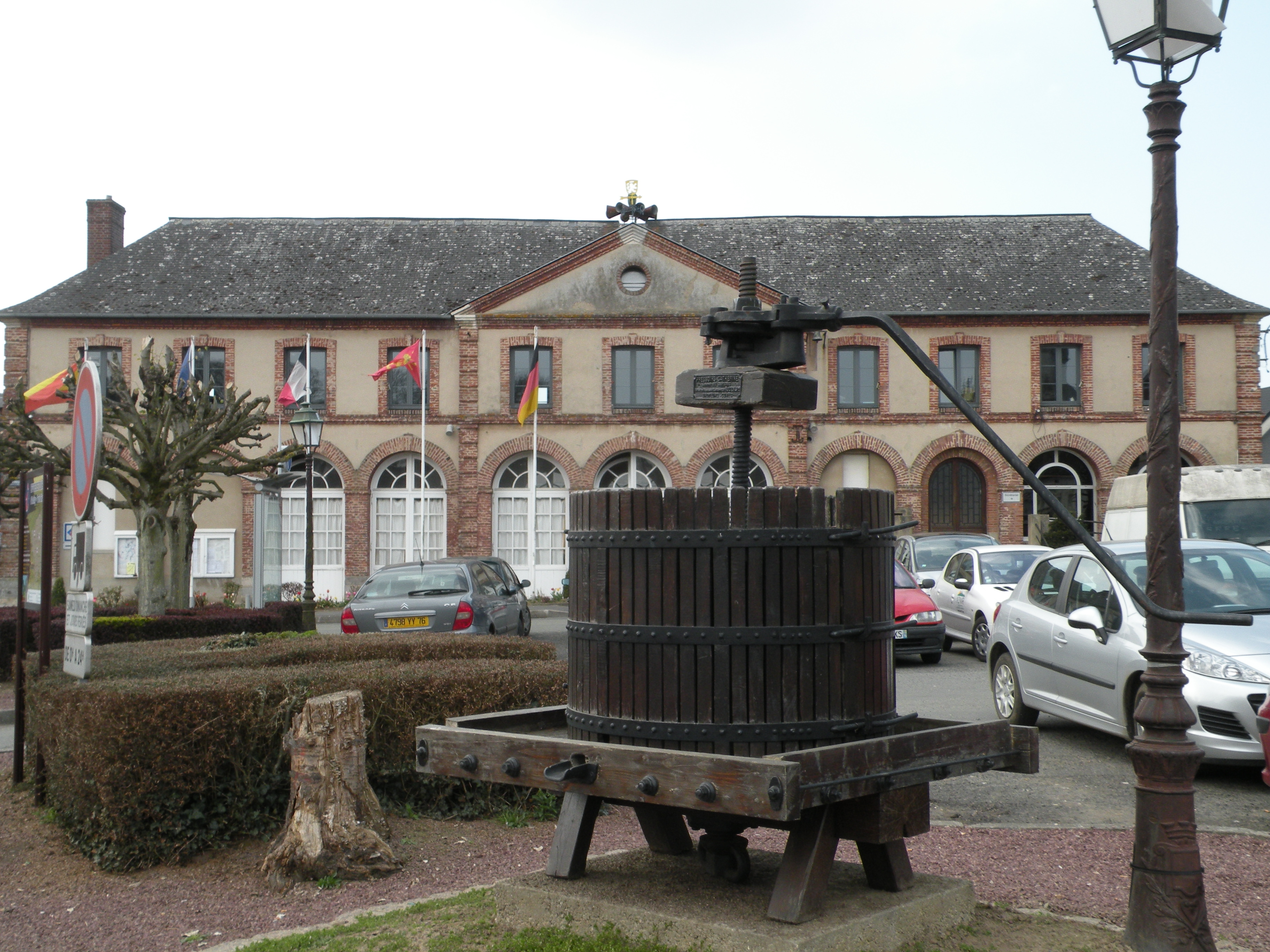 Mairie de Tôtes.